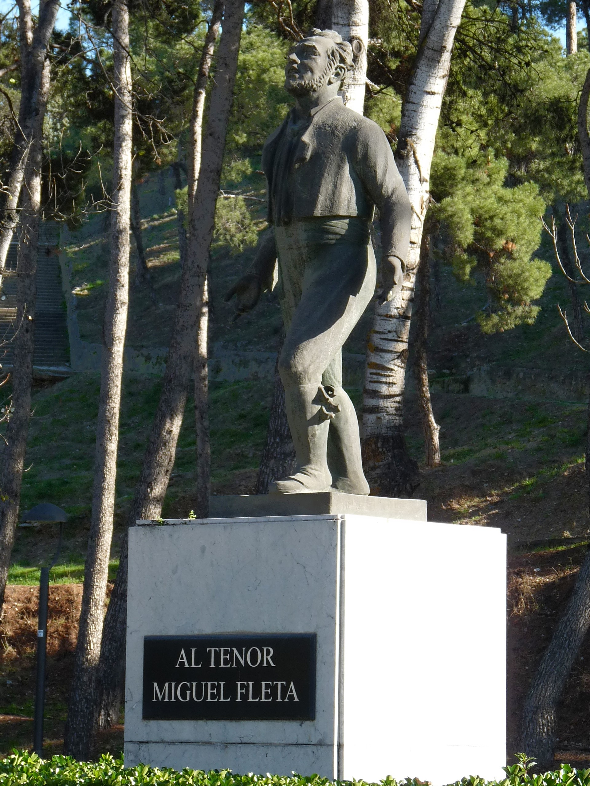 Zaragoza - Monumento al tenor Fleta en el Parque Grande